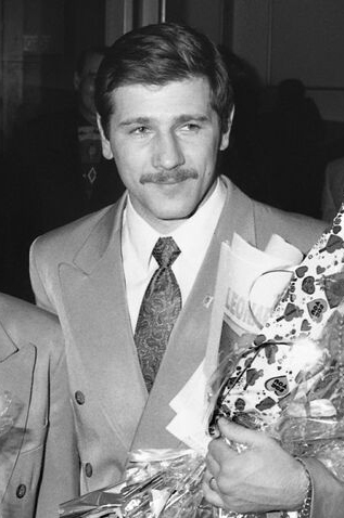 Francisc Vaștag